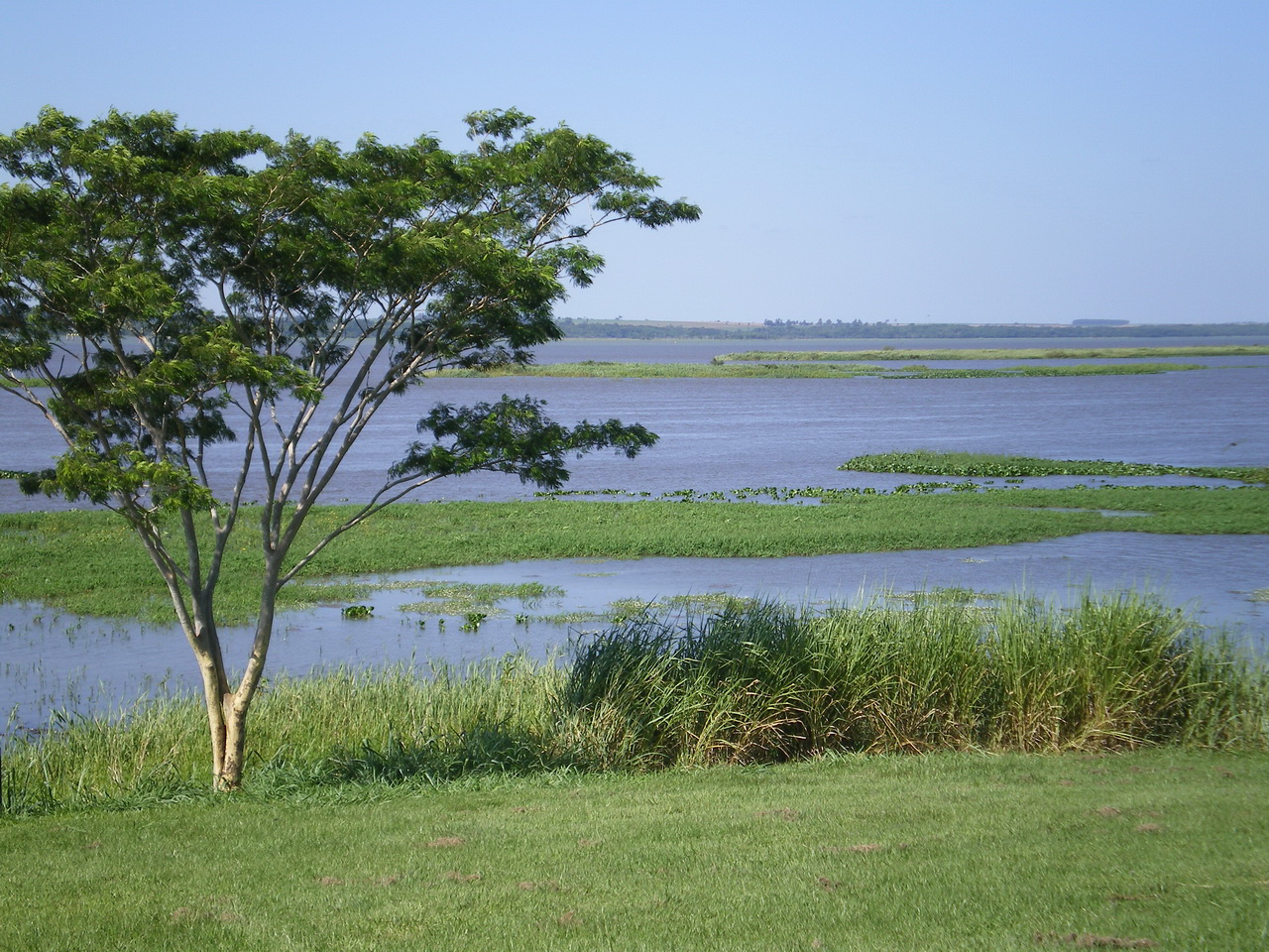 Fotos de los refugios y reservas de Itaipu, tomadas en los años 2007 y 2008 por mí Reserva de Mbaracayu